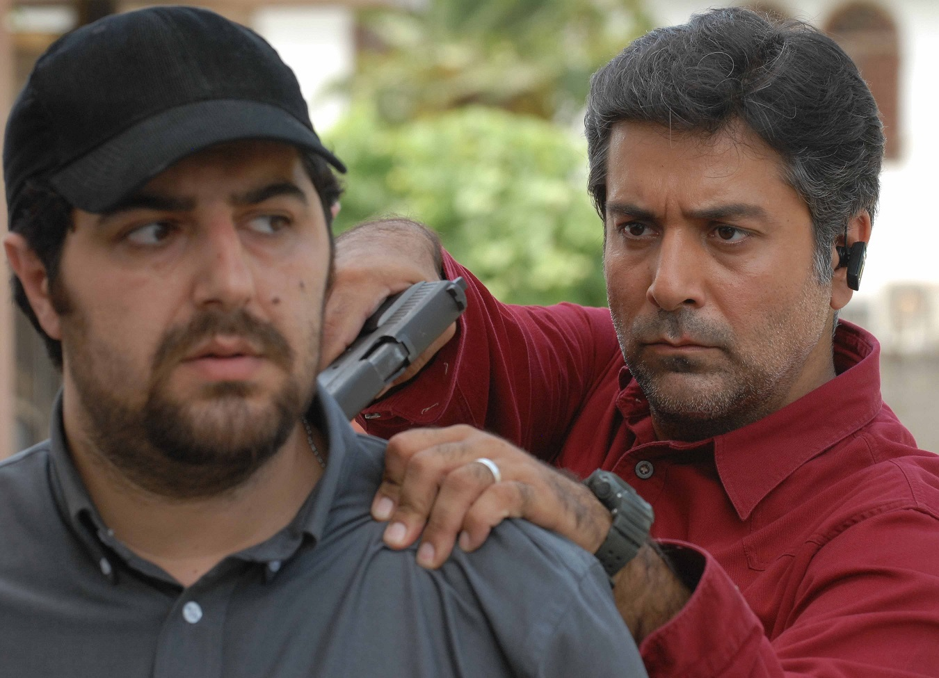 مجموعه تلویزیونی یک روزقبل - کارگردان: صادق کرمیار